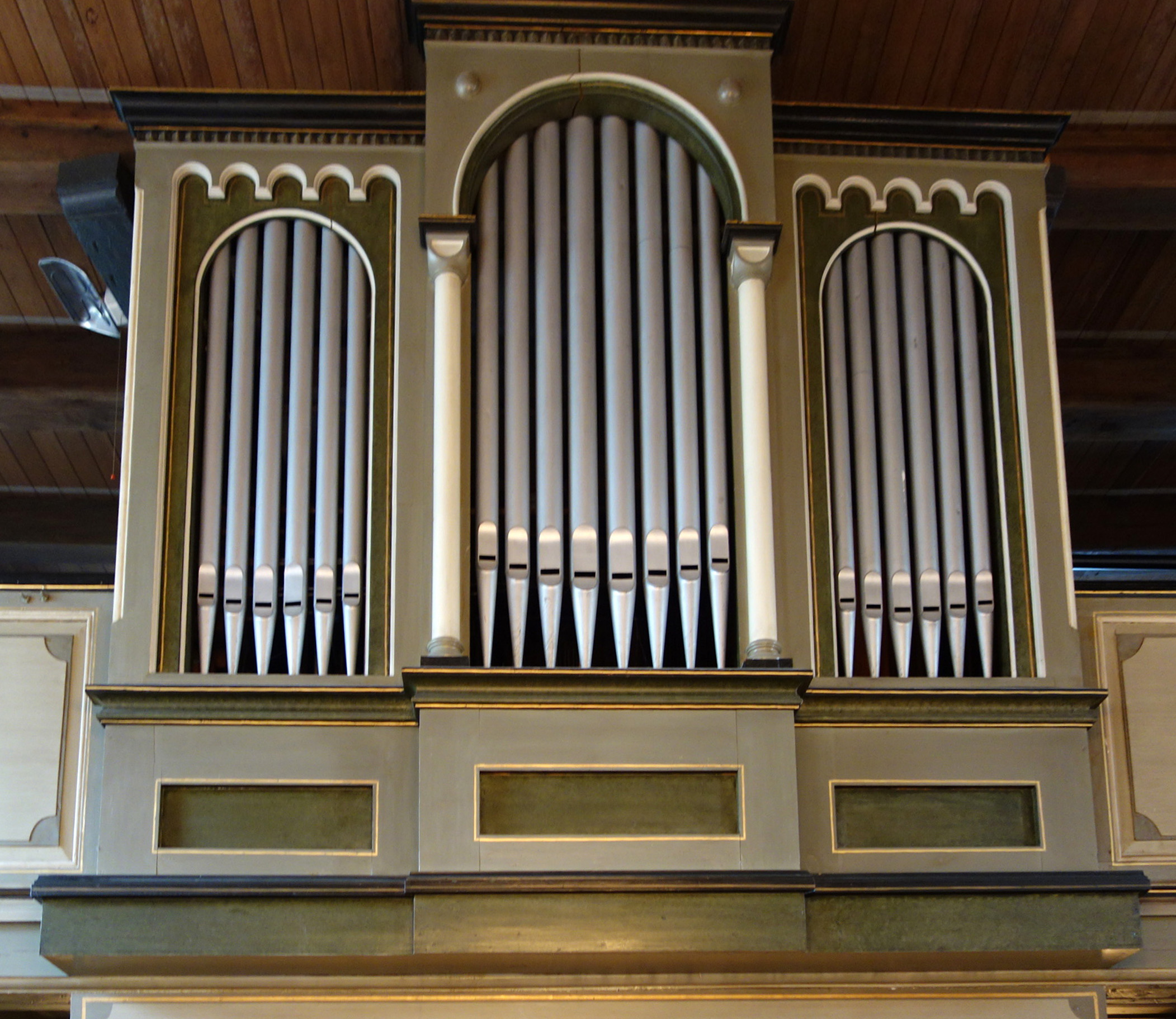 Orgel der St.-Andreas-Kirche, Haddeby, Schleswig-Holstein, Deutschland